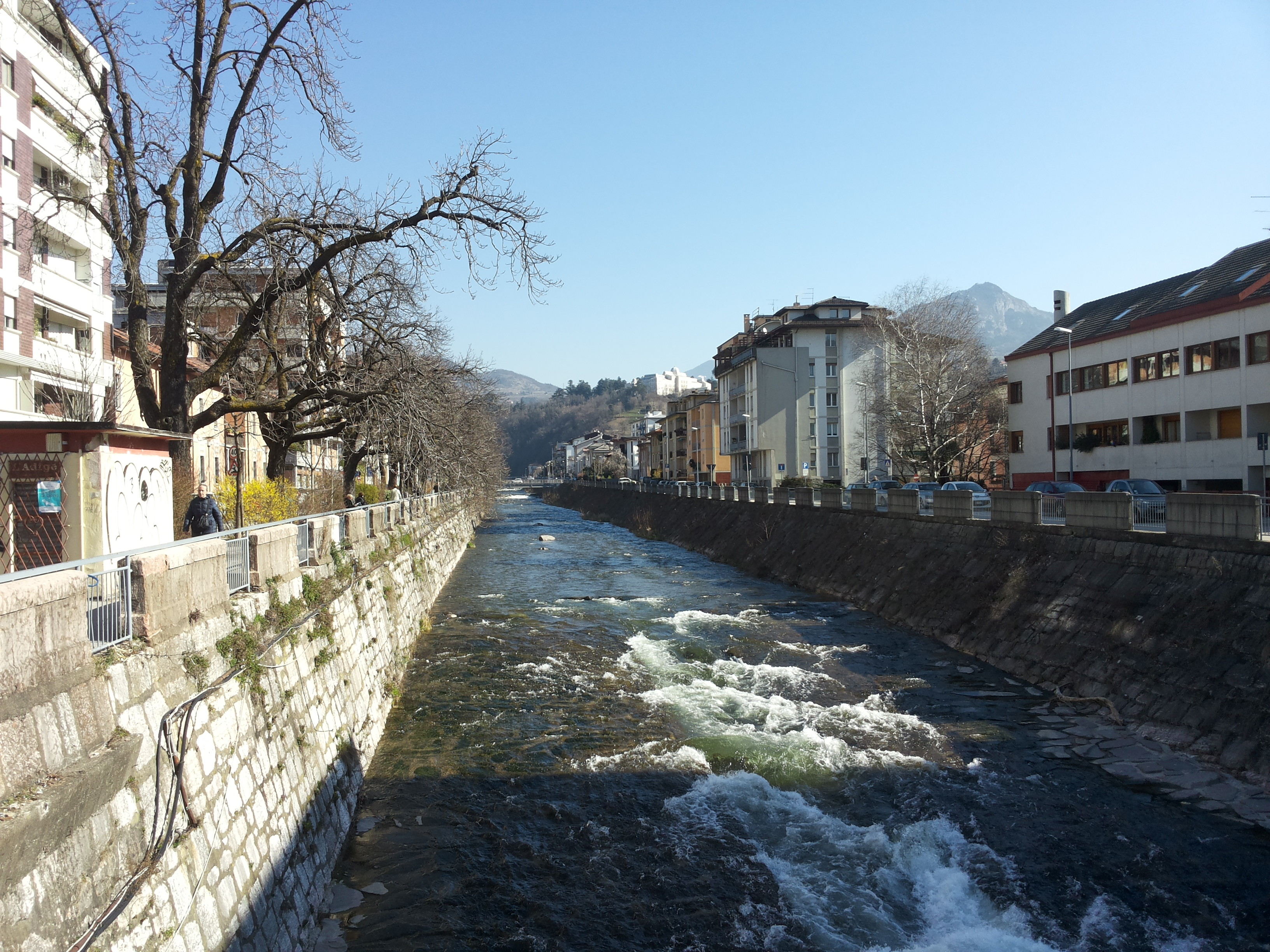 Torrente Feresina a Trento, visto dal ponte dei Cavalleggeri